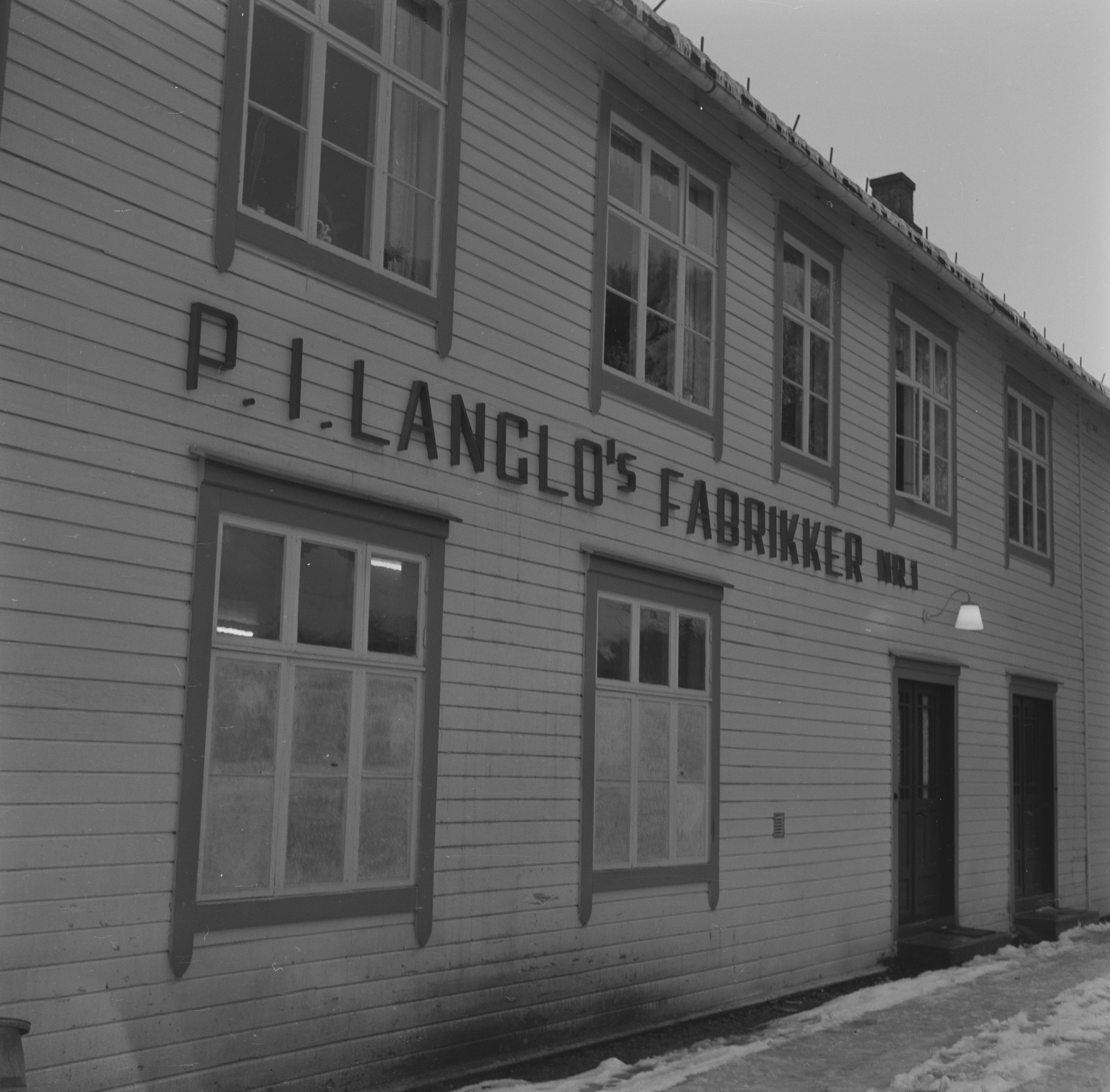 Bildet er hentet fra Arkivverket. P. I. Langlos Fabrikker, Stranda. NÅ nr. 1, 1953 Arkivinstitusjon : Riksarkivet Arkivnavn : Billedbladet NÅ Sted : Norge, Møre og Romsdal, Stranda, Emneord: Sunnmøre, P.I. Langlos Fabrikker, Industri, Møbelfabrikk, Næringsliv, Eksteriør Avbildet